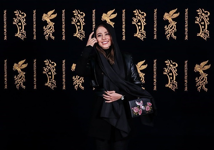 الناز حبیبی بازیگر فیلم خجالت نکش در سی‌وششمین جشنواره فیلم فجر